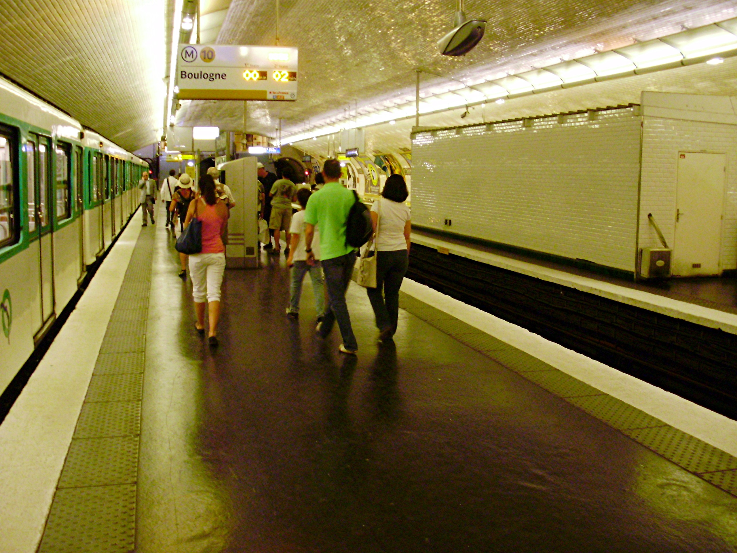 Quai de la station Porte d'Auteuil du métro de Paris